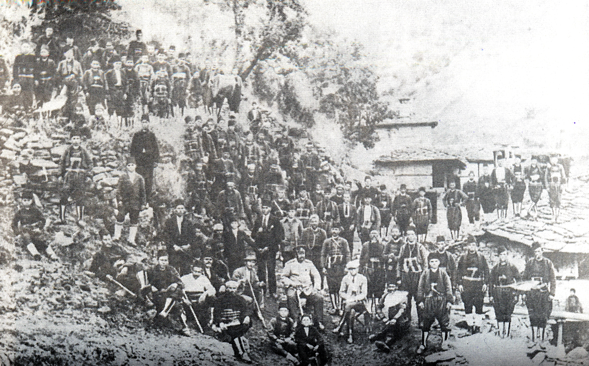 Богутево 1922 година - завръщането след изселничество в Турция